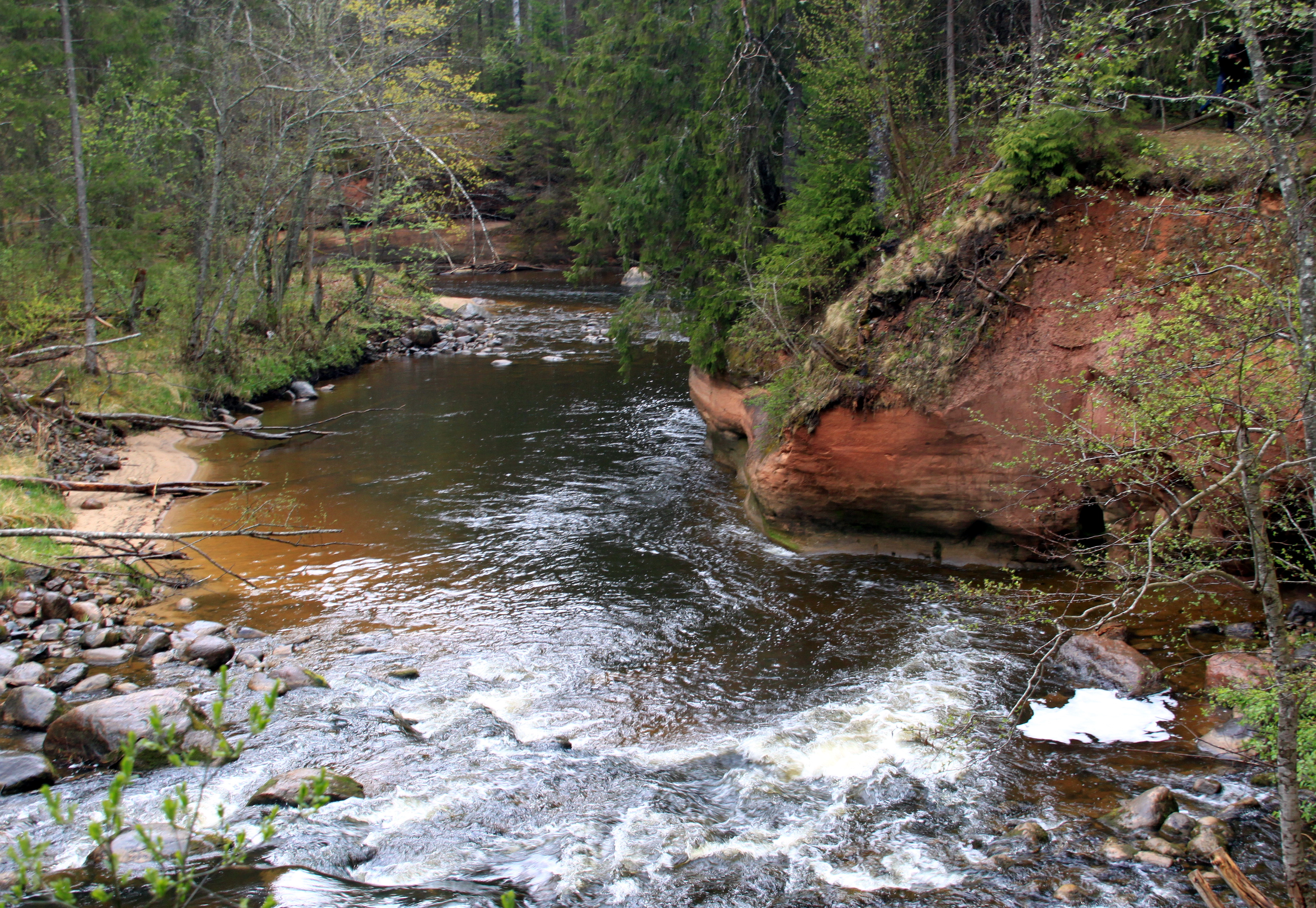 Lustūzis